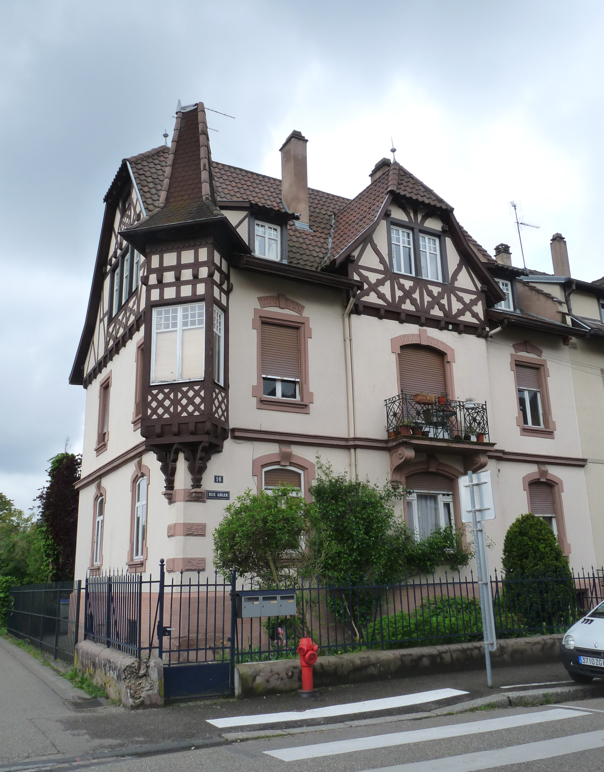 Villa, rue Adler, quartier de la Robertsau (Strasbourg)